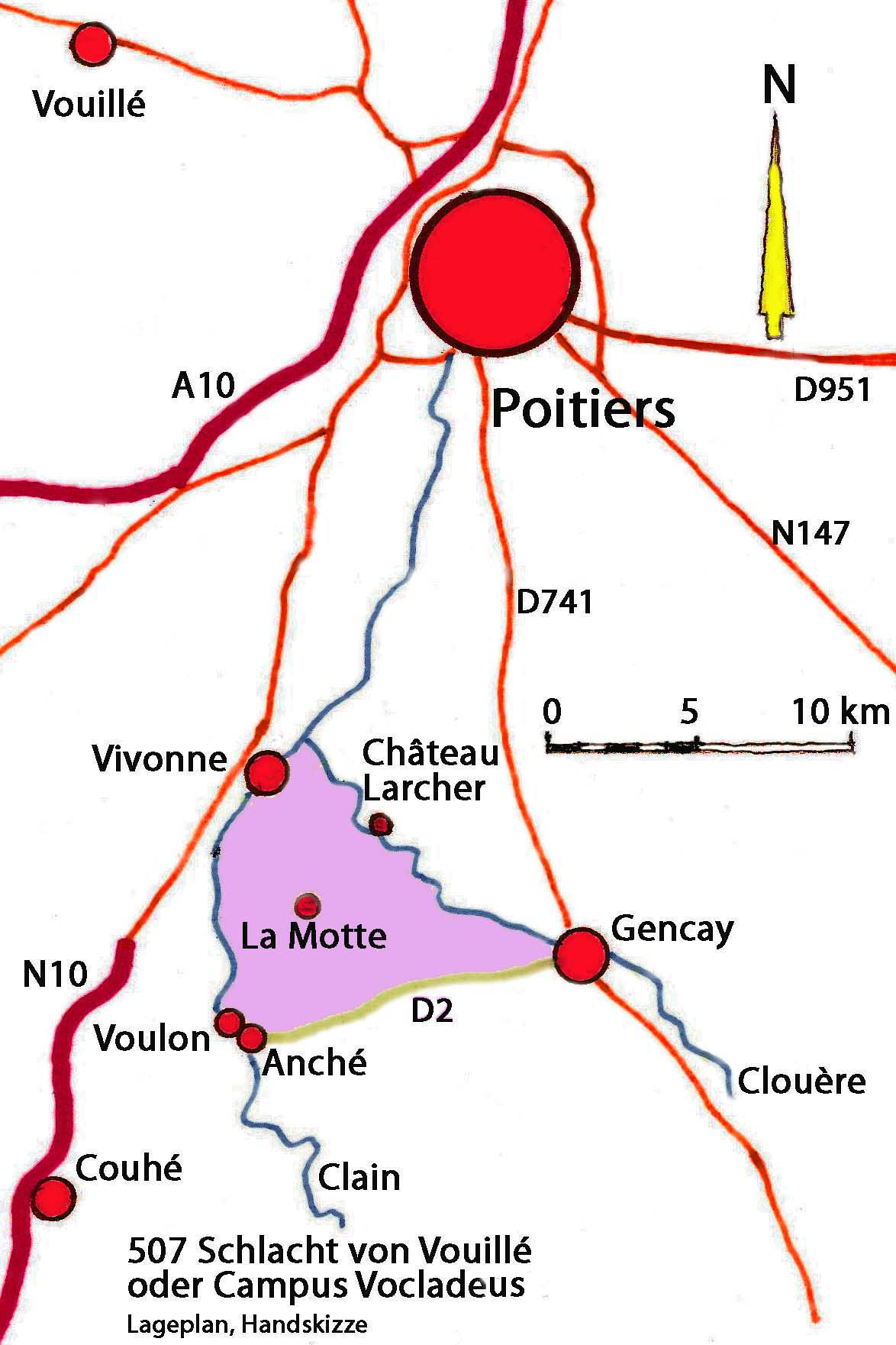 Schlacht_von_Vouillé_oder_Campus_Vocladeus, Lageplan, Handskizze